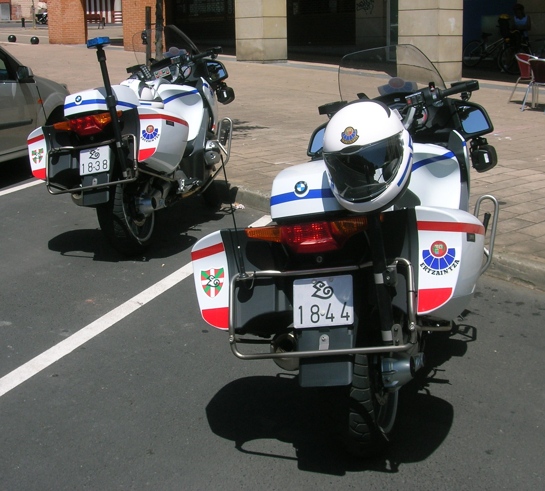 BMW motorcycles of the Ertzaintza (police forces of the Autonomous Community of the Basque Country) parked in Leioa